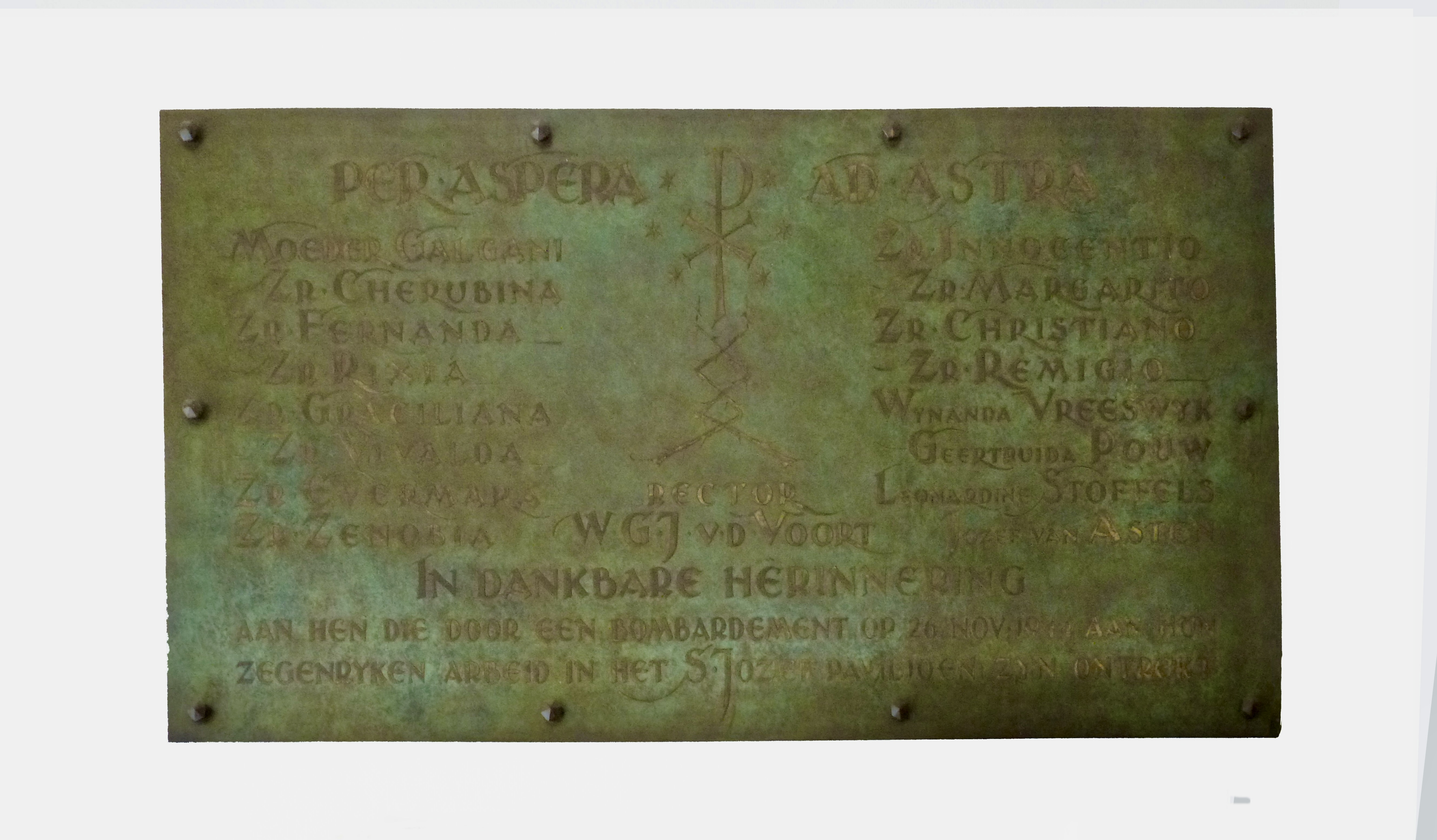 Oorlogsmonument in het voormalige Jozef paviljoen in Gouda aan de Graaf Florisweg. Plaquette in de hal van het Sint Jozefziekenhuis ter herinnering aan de omgekomen medewerkers van het ziekenhuis in de 2e wereldoorlog. Het paviljoen is een gemeentelijk monument